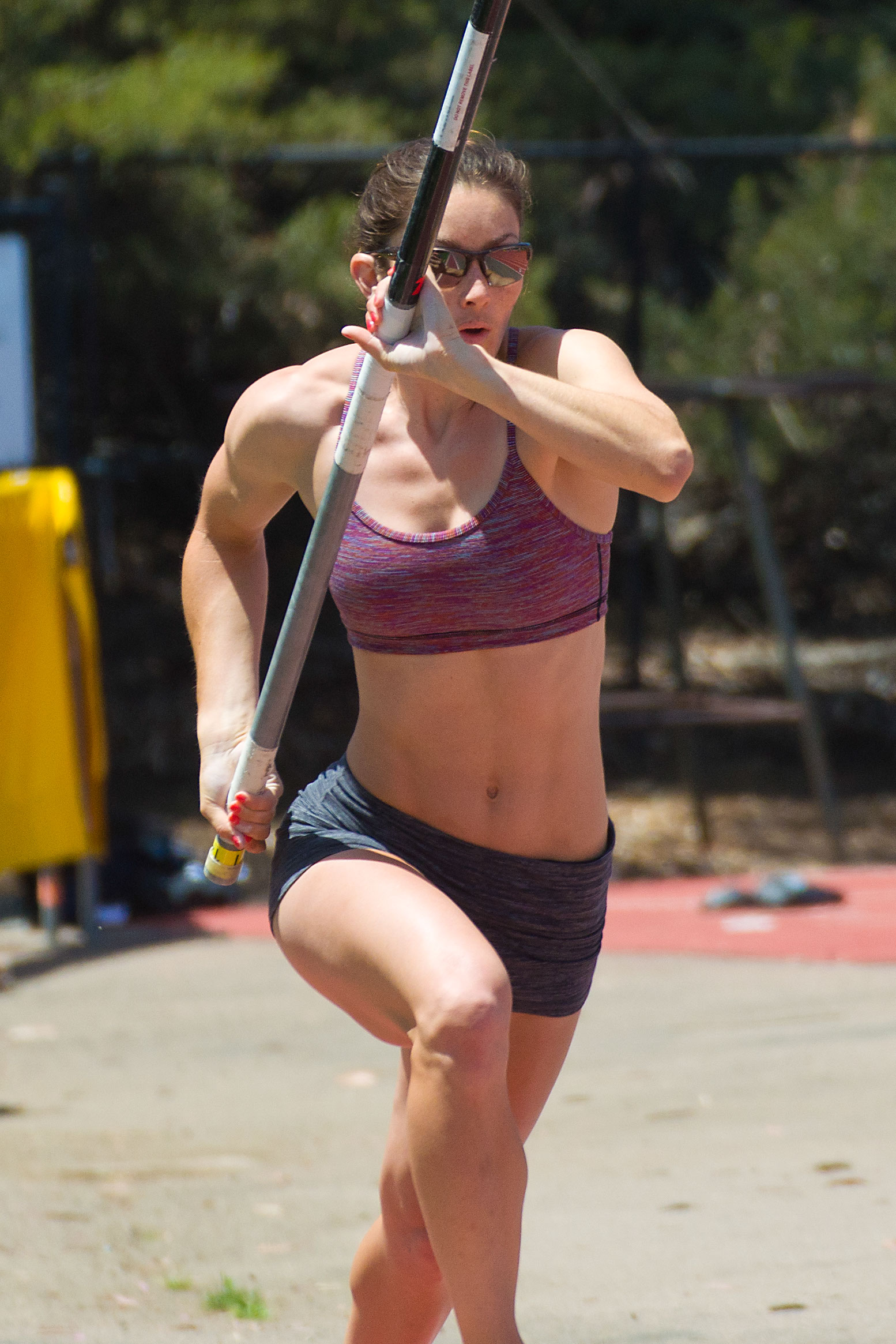 Triton Invitational 2012 029 Tori Pena